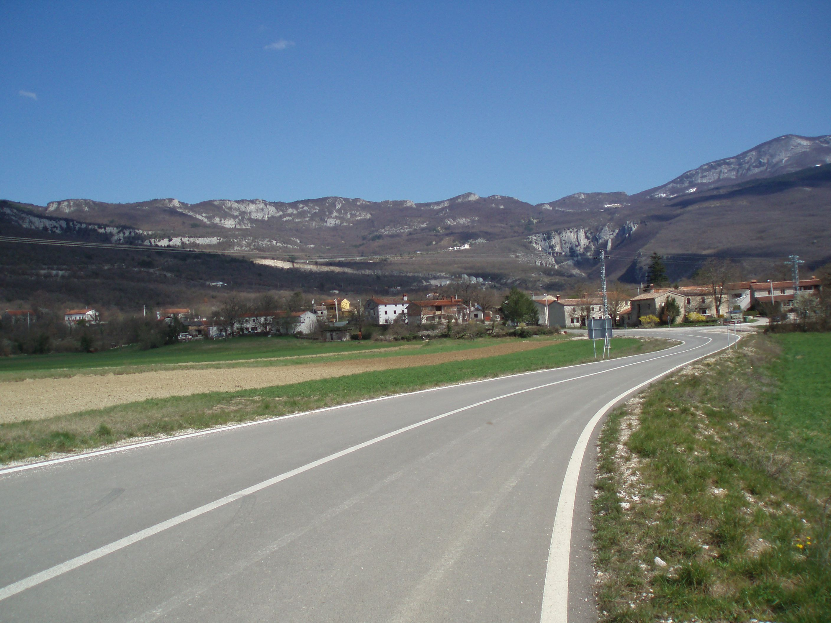 Vranja, malo selo u Istri, smješteno ispod obronaka Učke.